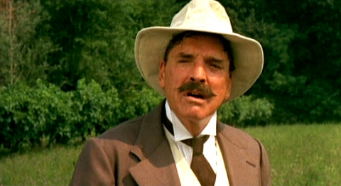 Screenshot del film Novecento (1976)